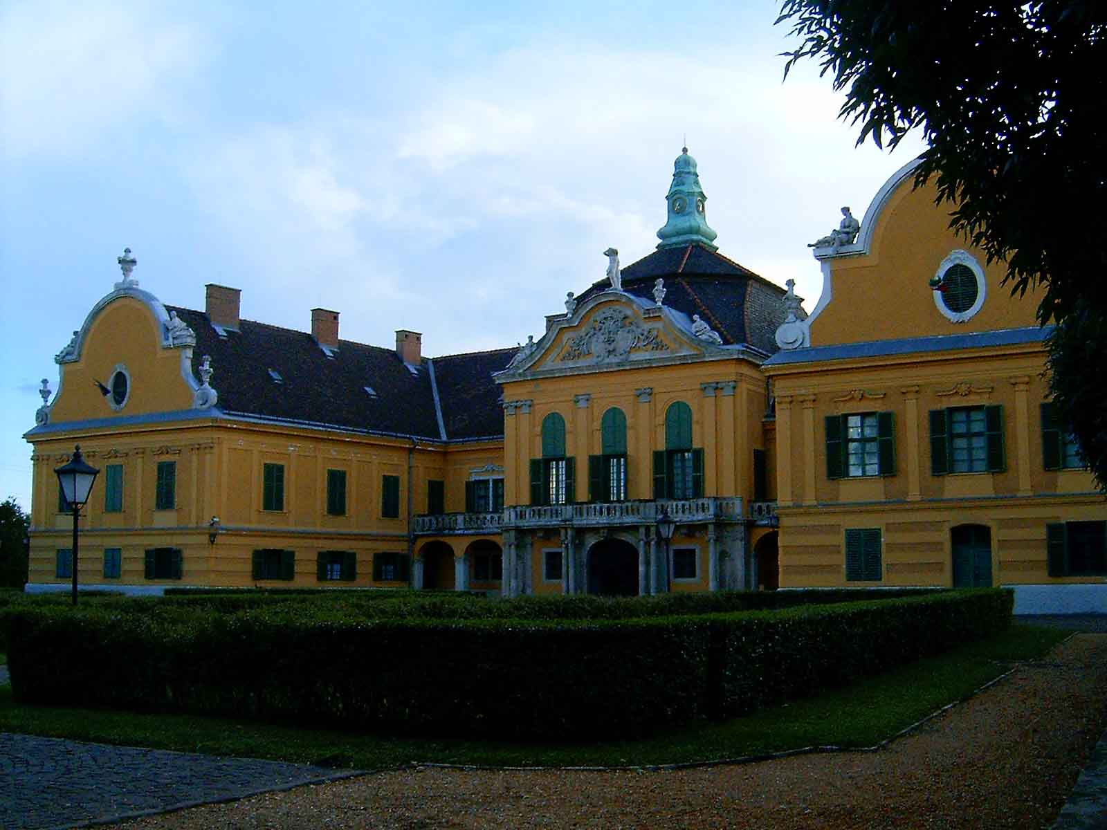 Schloss Nagytétény im 22. Bezirk. Schloss Nagytétény in Budapest.